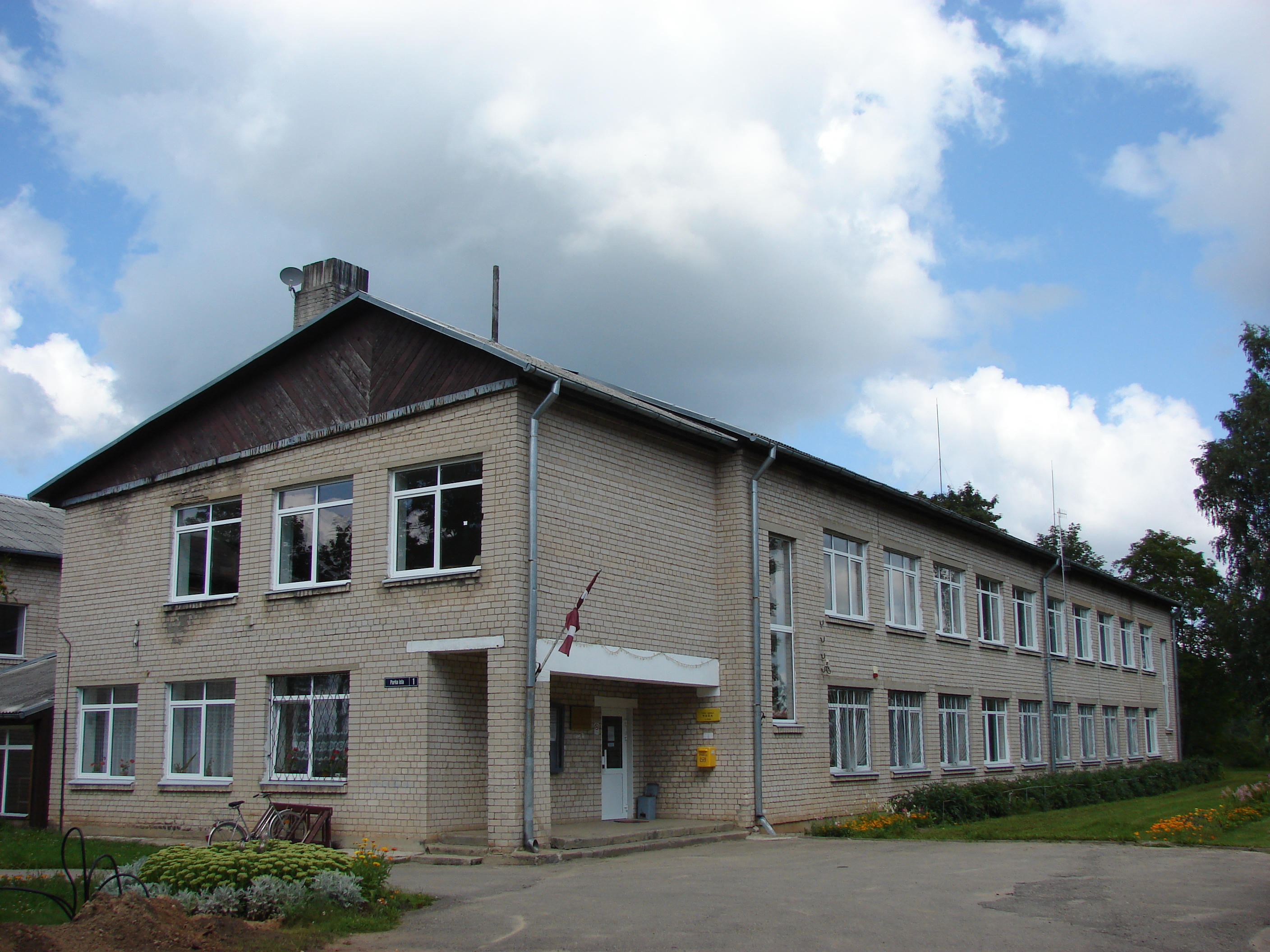 Pušas pasts, Puša, Pušas pagasts, Rēzeknes novads, Latvia